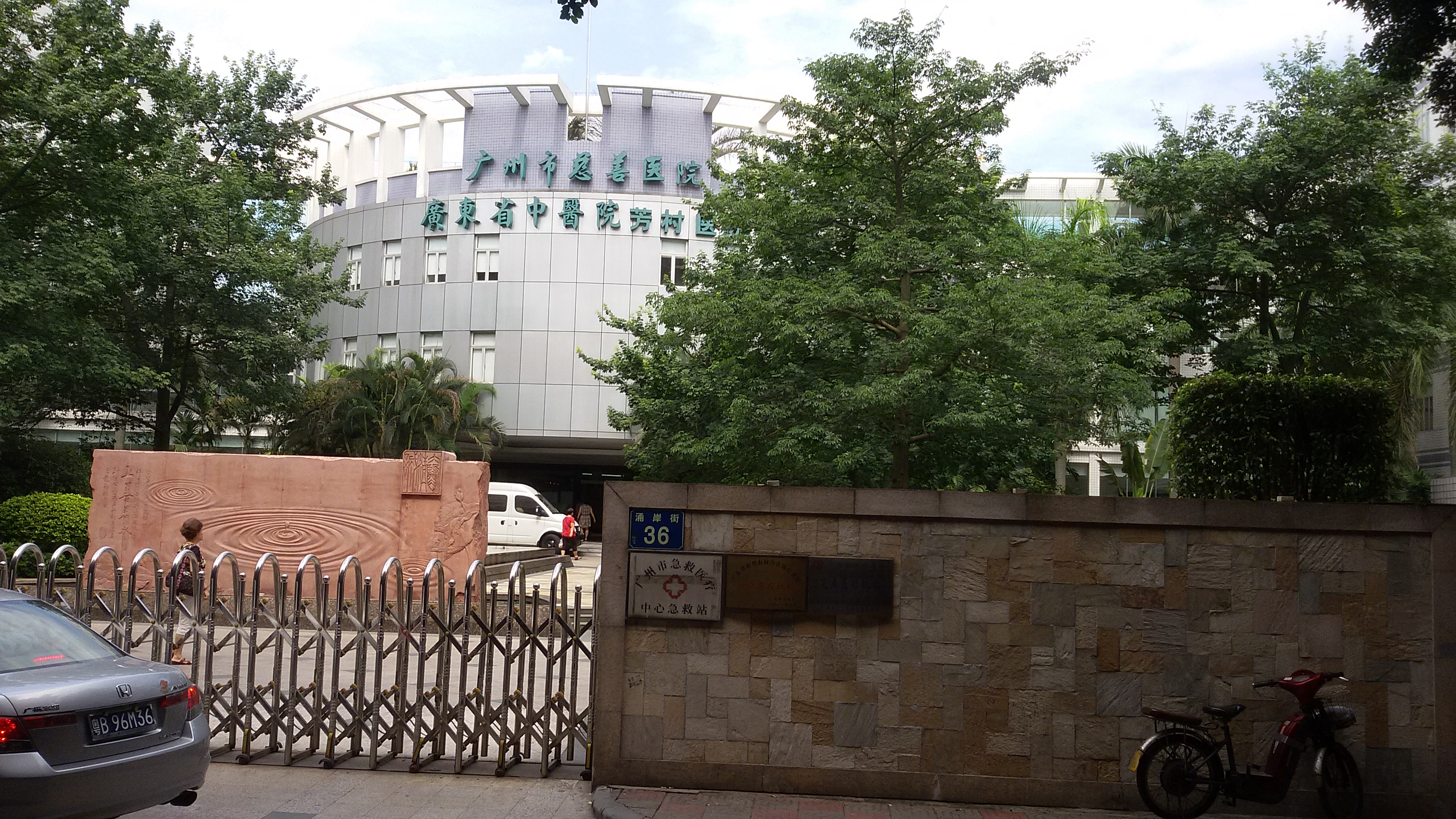 粵語: 廣東省中醫院（芳村分院）